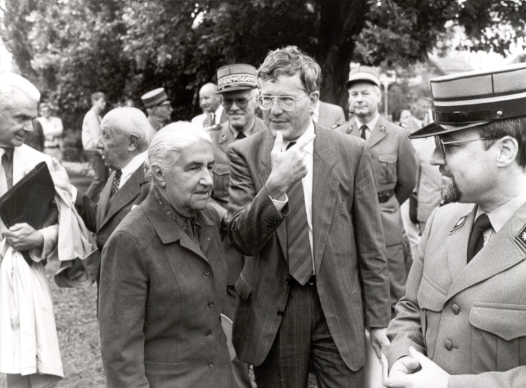 Jeanne Hersch und Kaspar Villiger anlässlich der „DIAMANT“- Wanderausstellung „Schweiz 1939 – 1945 in Spiez